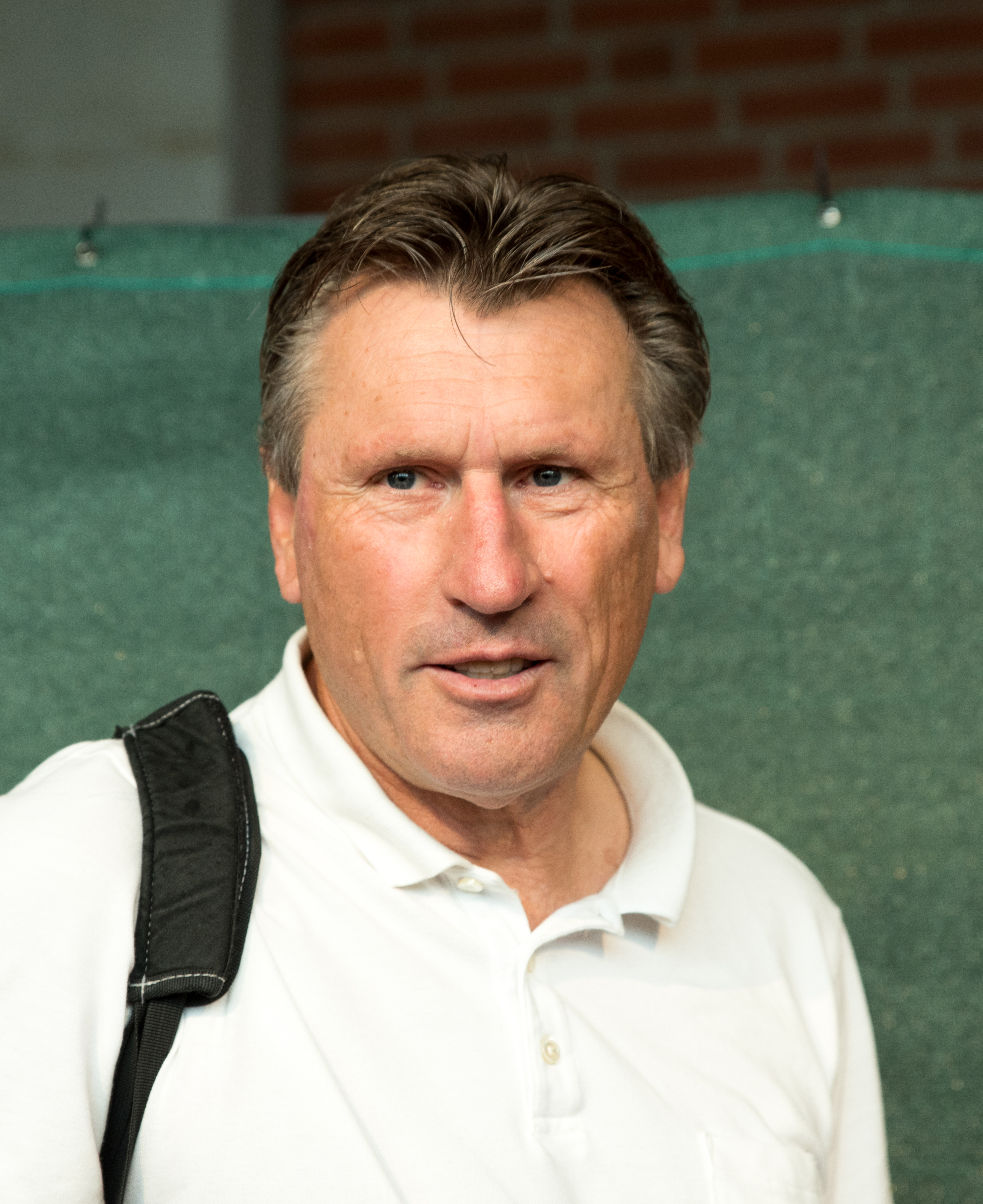 Manfred Kaltz beim Tag der Legenden 2016